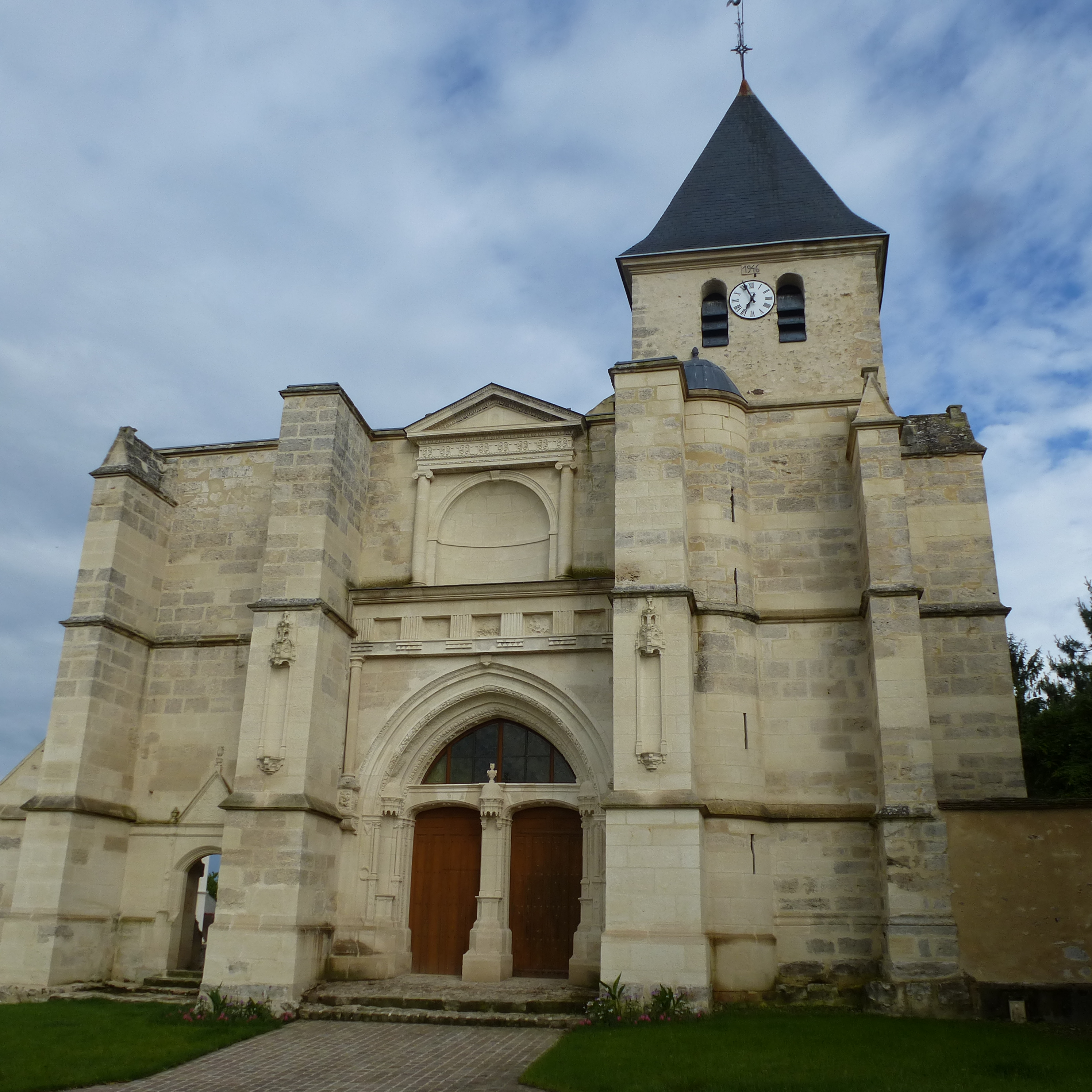 Porche de l'église Saint-Martin à Coulombs-en-Valois. (département de la Seine-et-Marne, région Île-de-France).